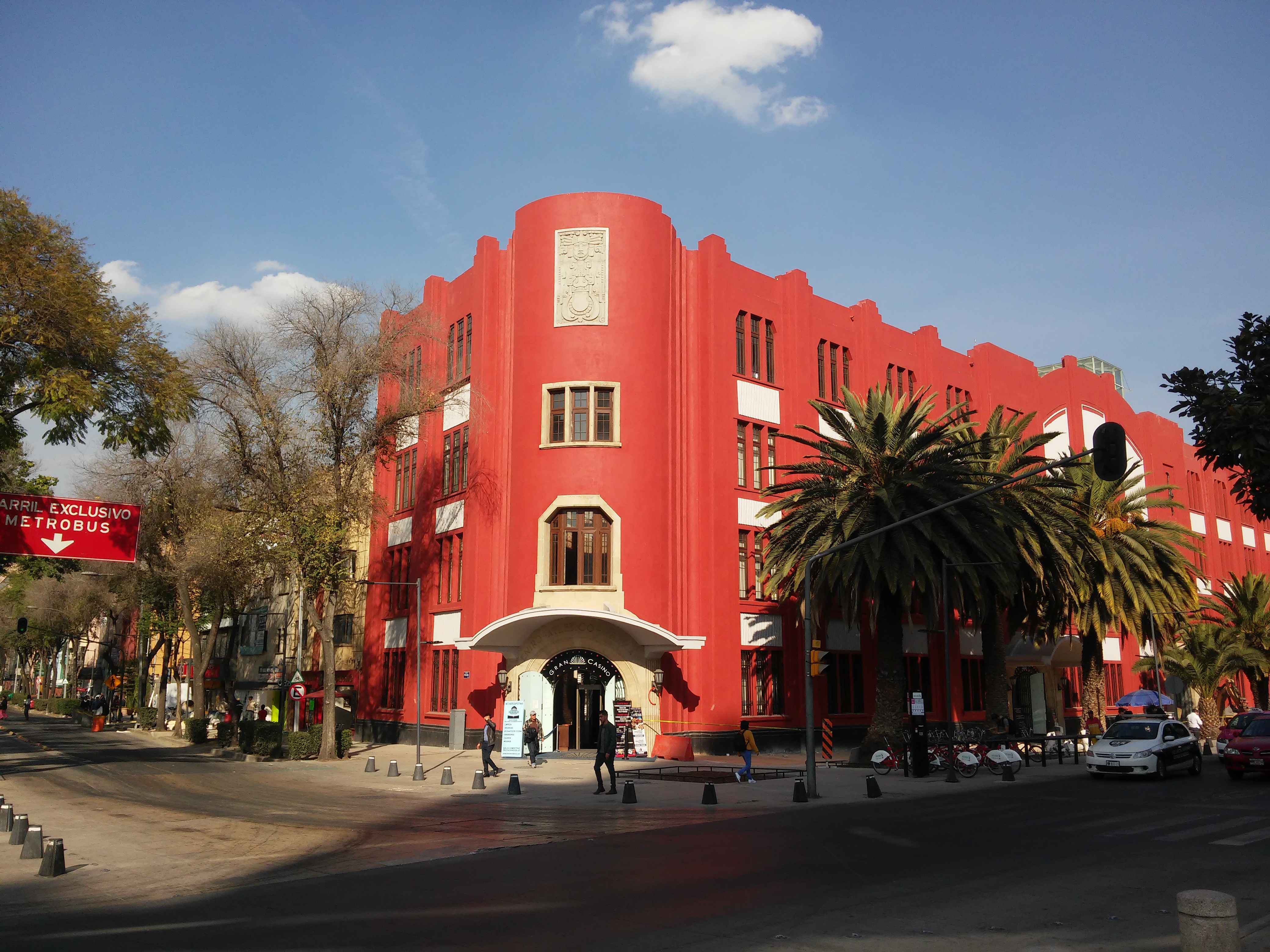 Fachada del Frontón México en la Ciudad de México